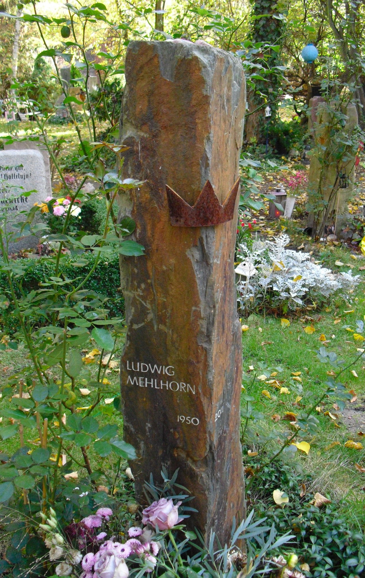 Grabstein für den Bürgerrechtler und Mathematiker Ludwig Mehlhorn auf dem Neuen Friedhof St. Marien-St. Nikolai in Berlin-Prenzlauer Berg